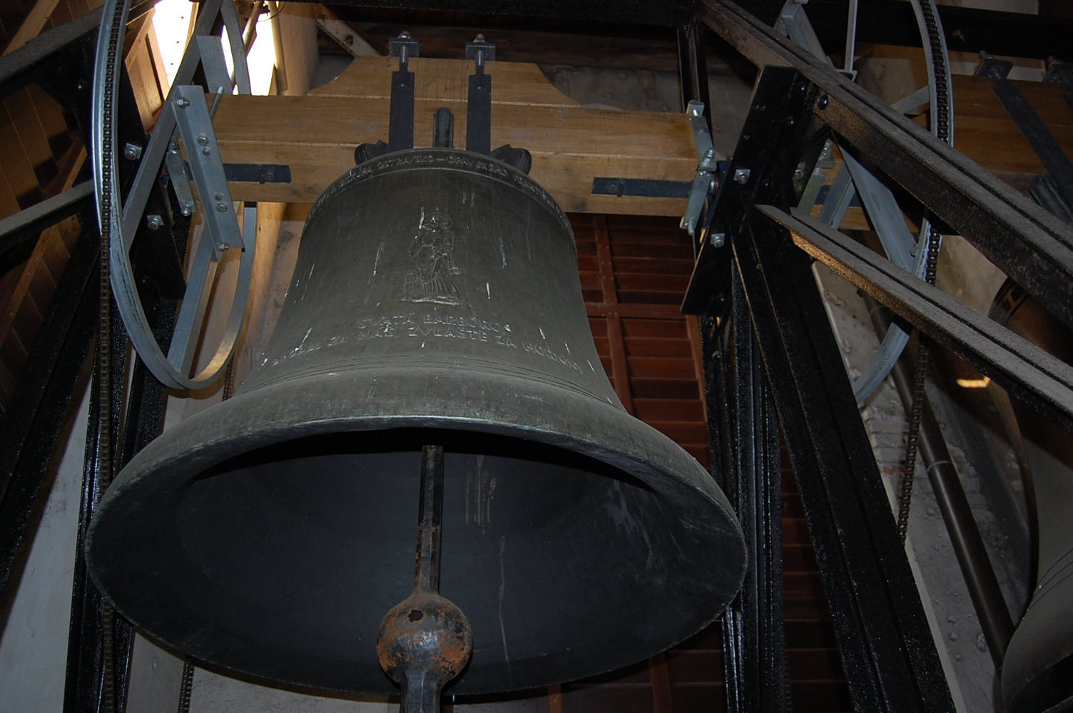 Kostel Narození Panny Marie v Orlové-Městě, zvon sv. Barbora. Noc kostelů 2015